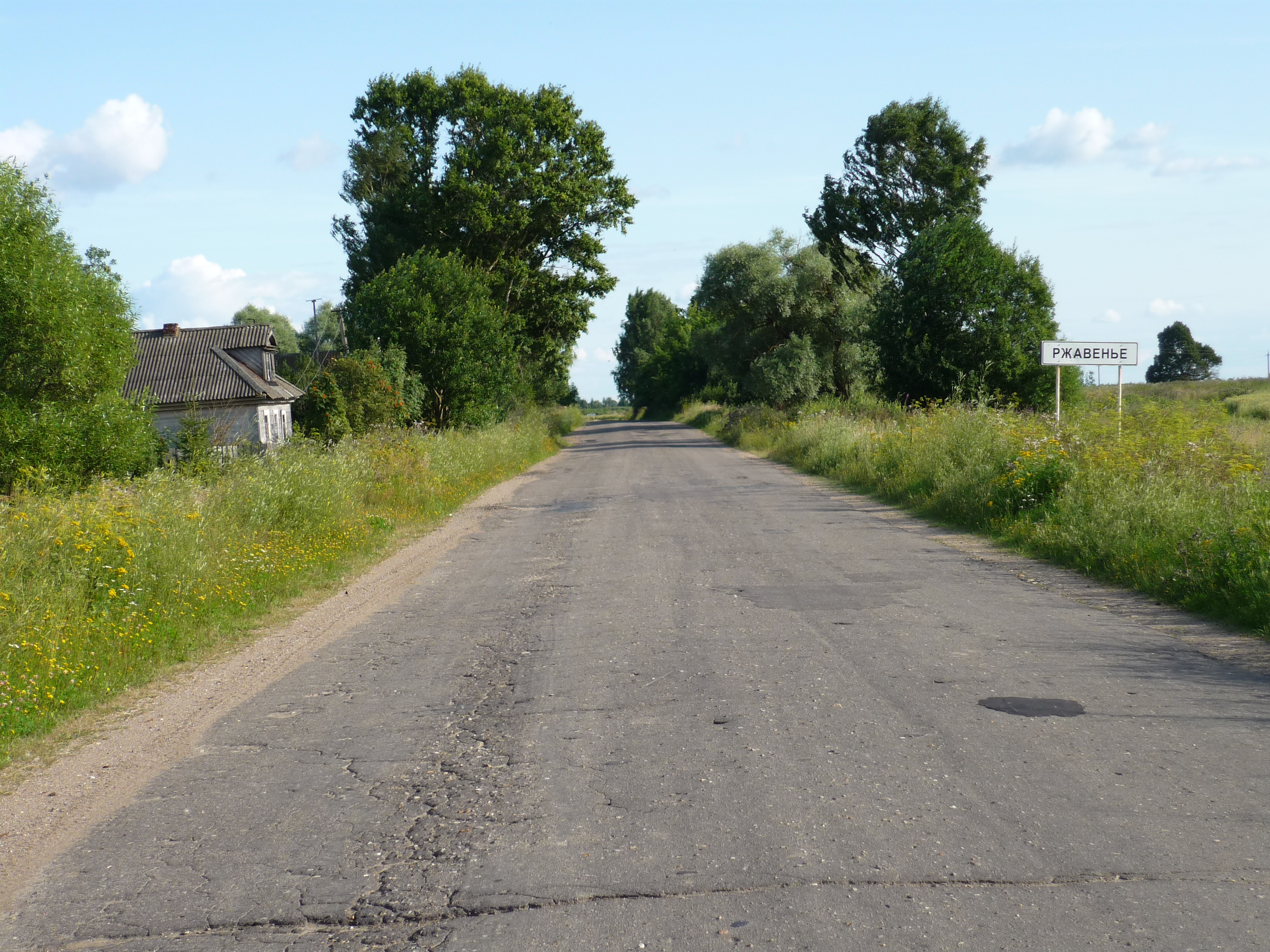 Деревня в смоленской области